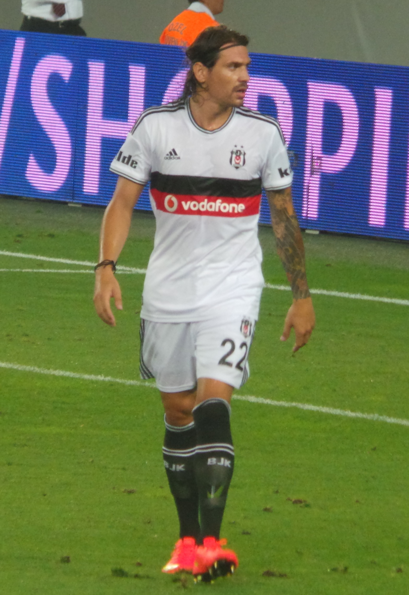 Ersan Gülüm SOMA tournament